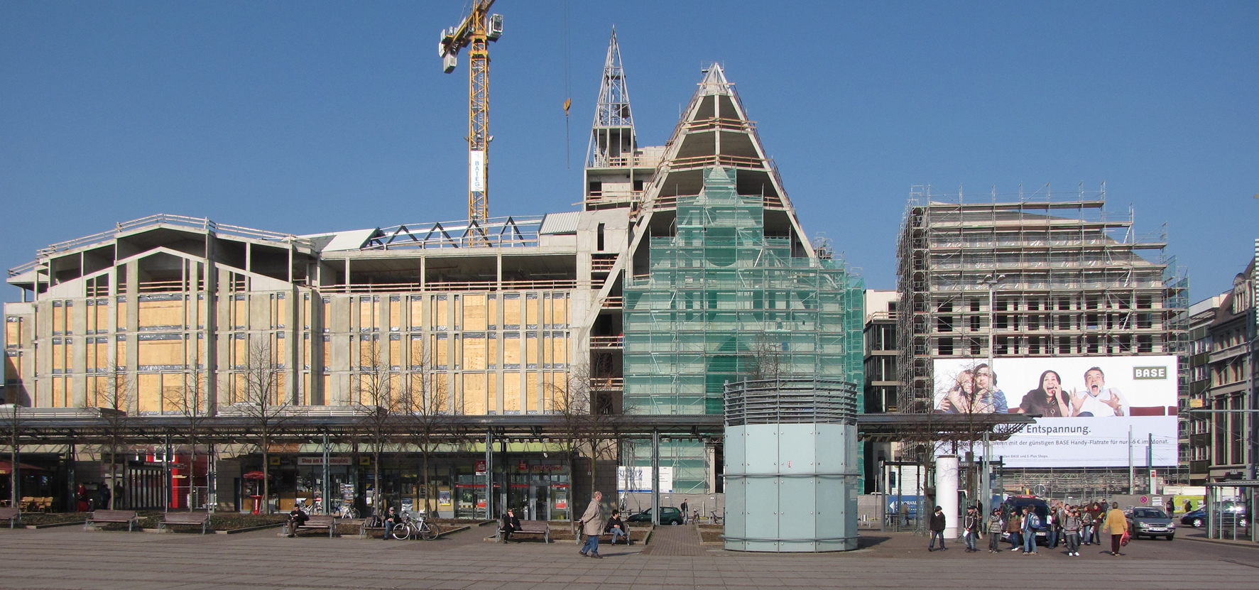 Universität Leipzig, Neubau Hauptgebäude und Paulinum am Augustusplatz